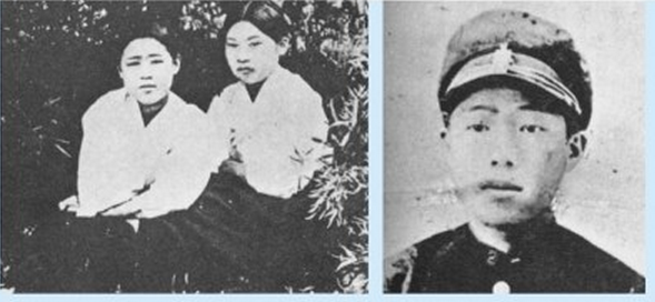 1929년 11월 광주학생항일운동 관련자들